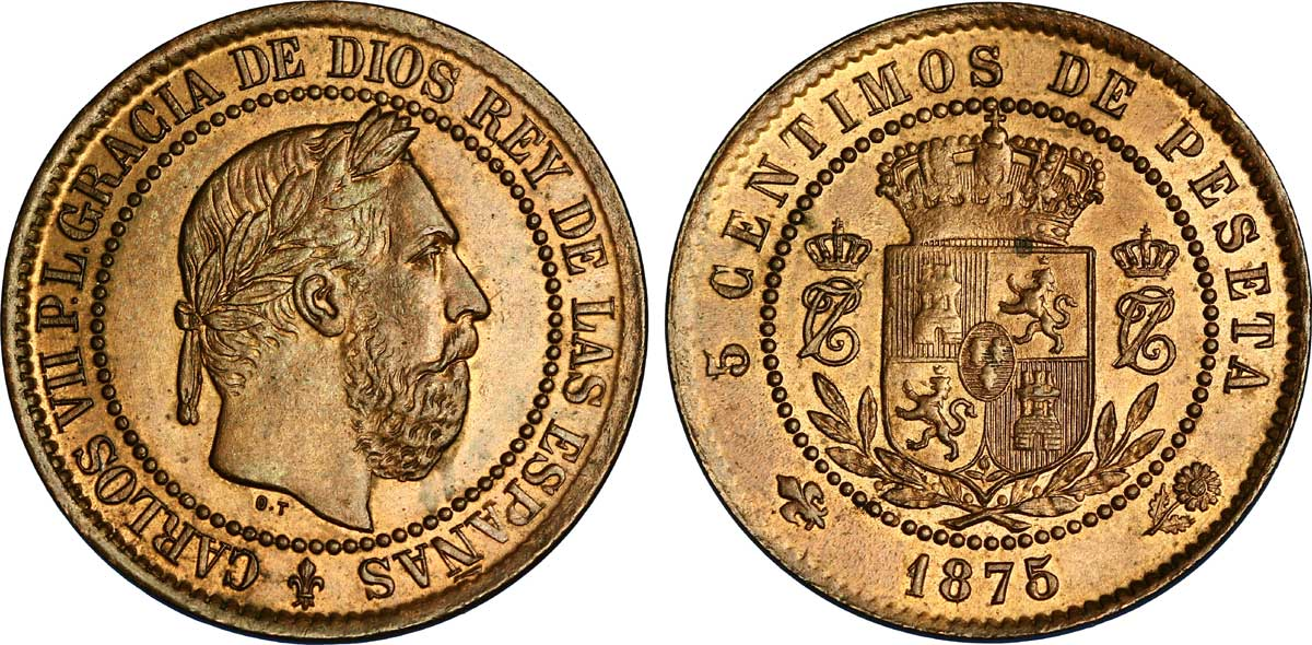 5 Centimos à l'effigie de Charles VII (Charles de Bourbon, prétendant carliste), 1875. En 1833, Ferdinand VII supprime la loi salique, ce qui permet à sa fille Isabelle II de lui succèder. Son frère, l’infant Charles V de Bourbon, se proclama roi soutenu par une partie du peuple espagnol, les “carlistes”. Les prétendants carlistes seront à l’origine de trois guerres. La dernière (1872-1876) est dirigée par son petit-fils Charles VII contre Amédée de Savoie puis contre la 1ère République..